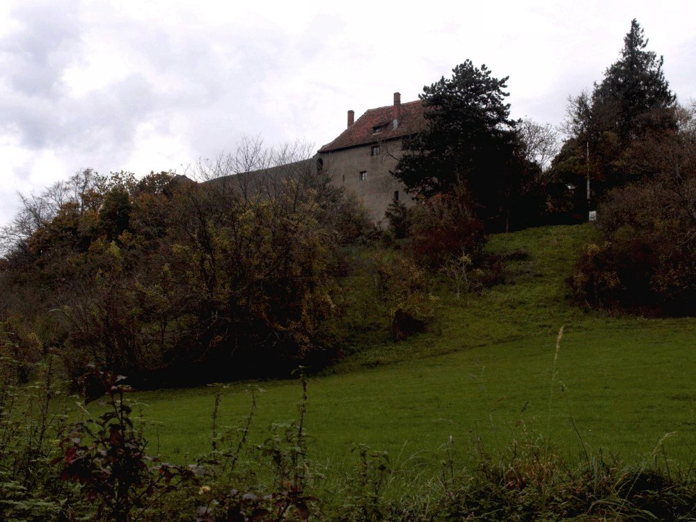 Castle Friedingen, Singen , Badenwurttemberg, Germany